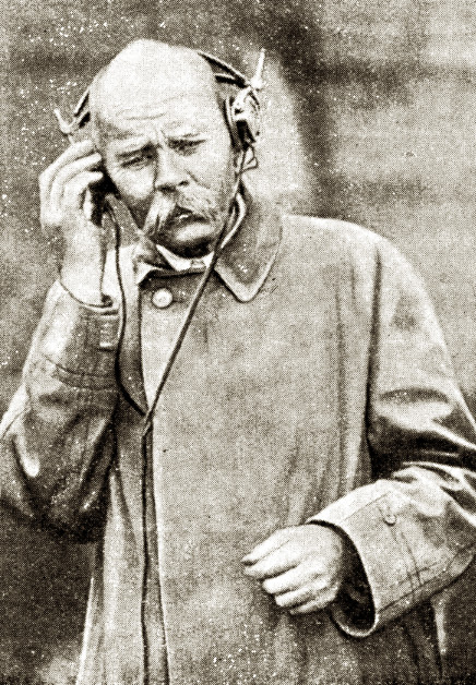 Максим Горький слушает радиопередачу в Нижегородской радиолаборатории